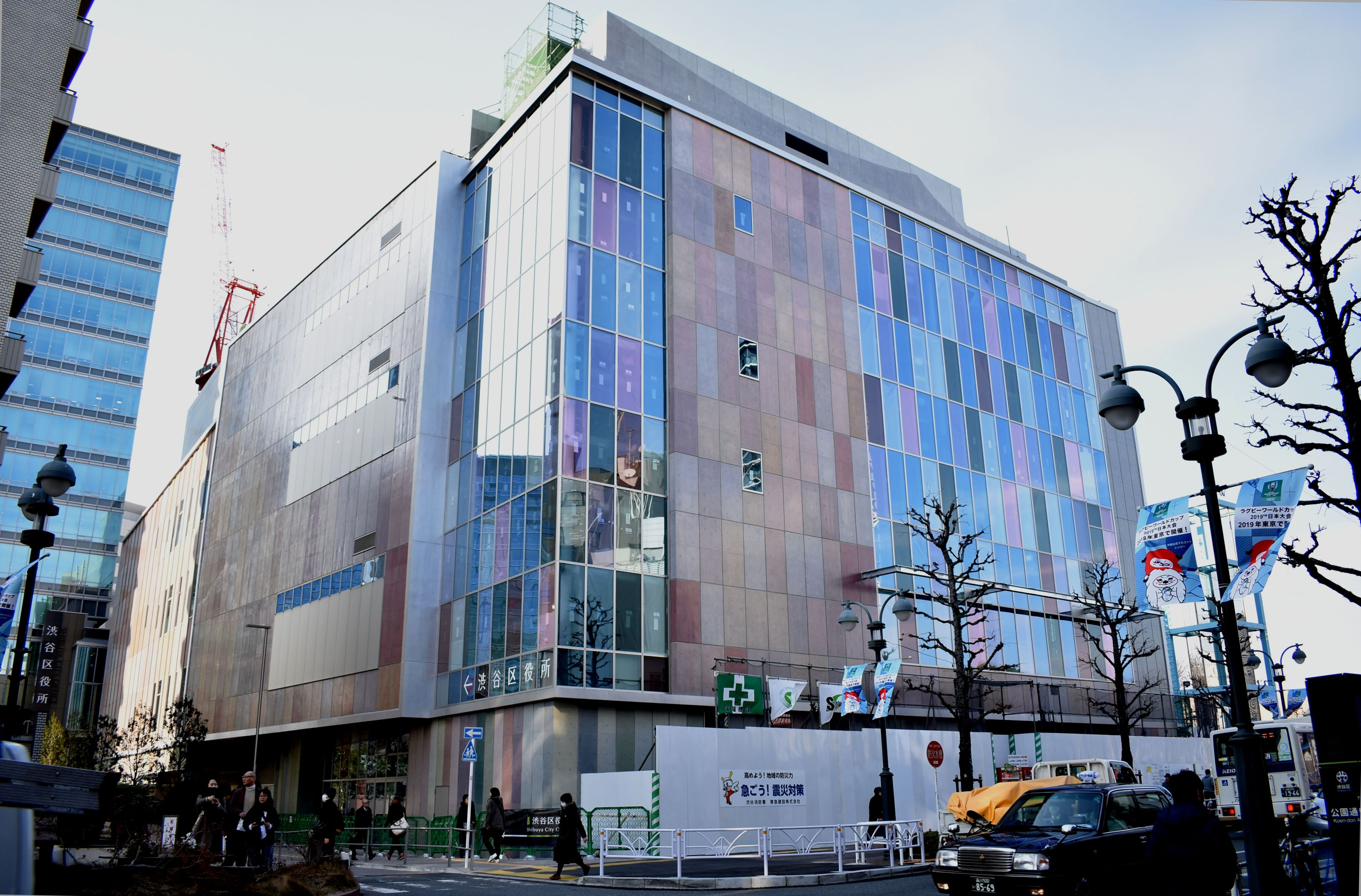 渋谷公会堂 Nikon D3400